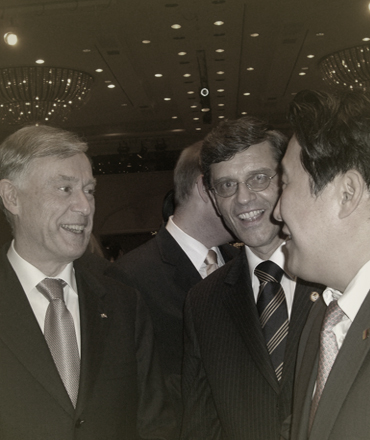 독일 9대 대통령 호르스트 쾰러와 독일 문화부 장관 한스 울리히 자이트, 스벤 리 박사